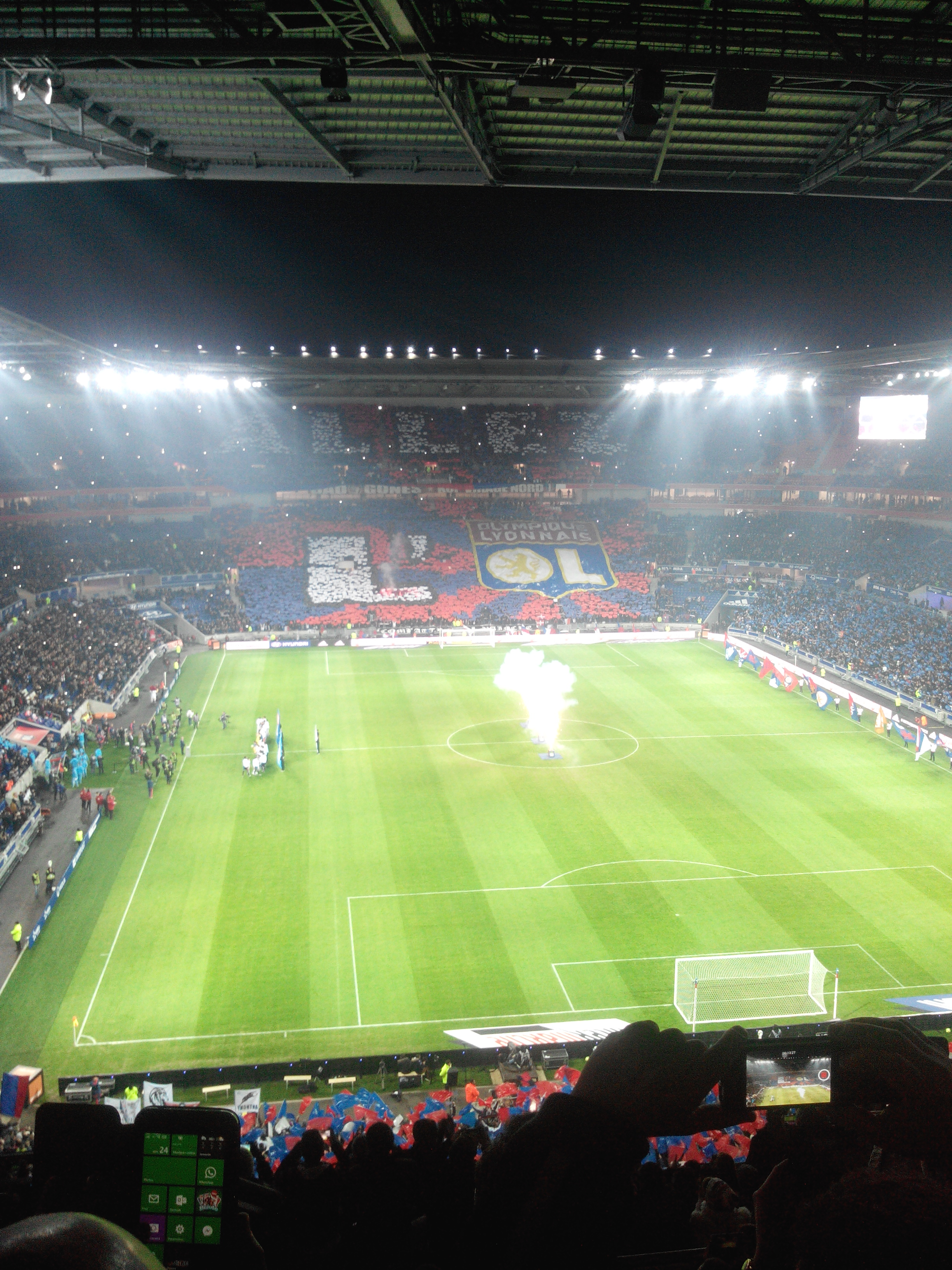 Tifo du virage Nord lors du match Olympique lyonnais-Olympique de Marseille au Parc Olympique Lyonnais.